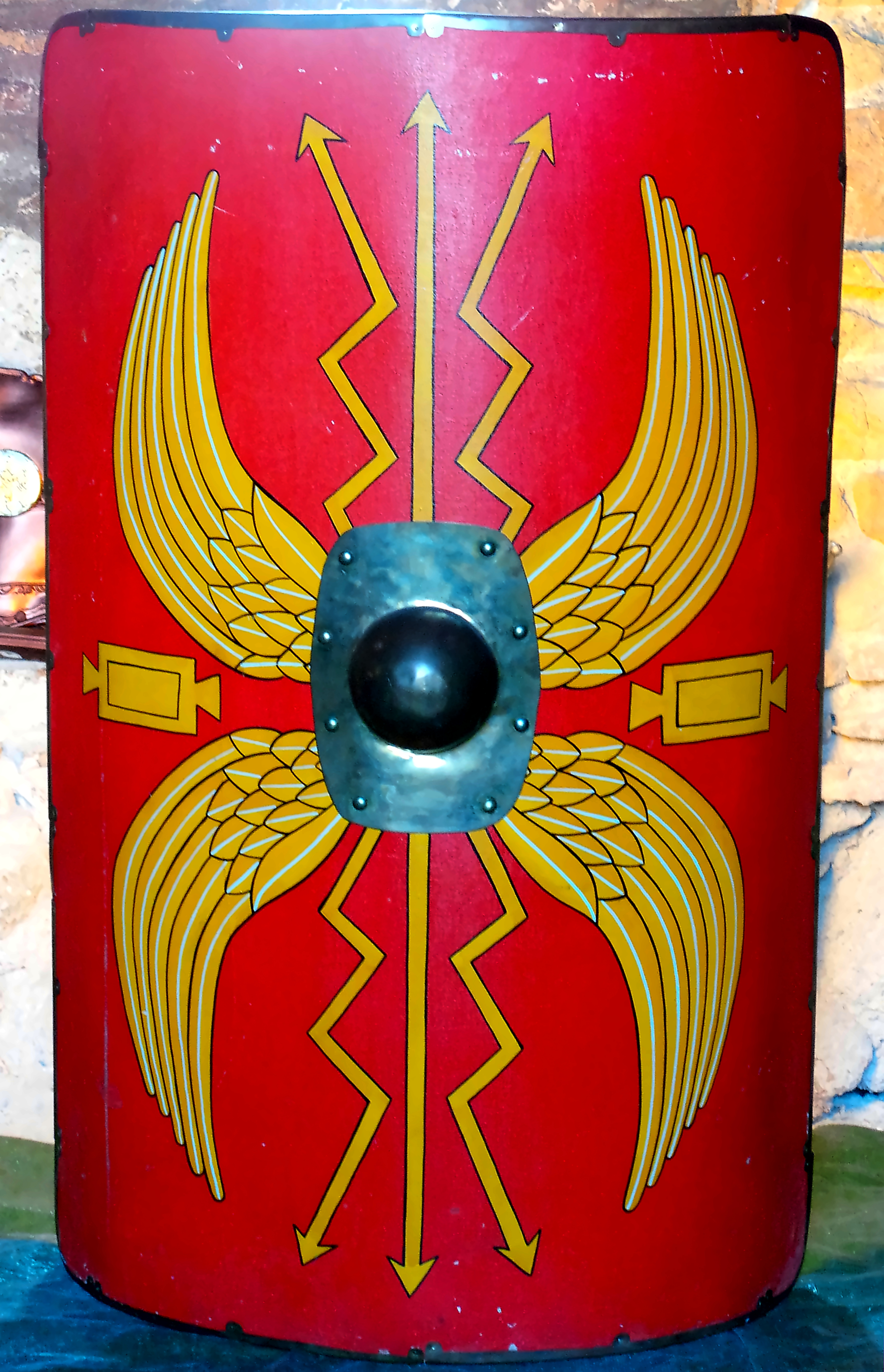 Moderne Rekonstruktion eines römischen Scutum, ausgestellt im Stadtmauermuseum Porta San Sebstiano